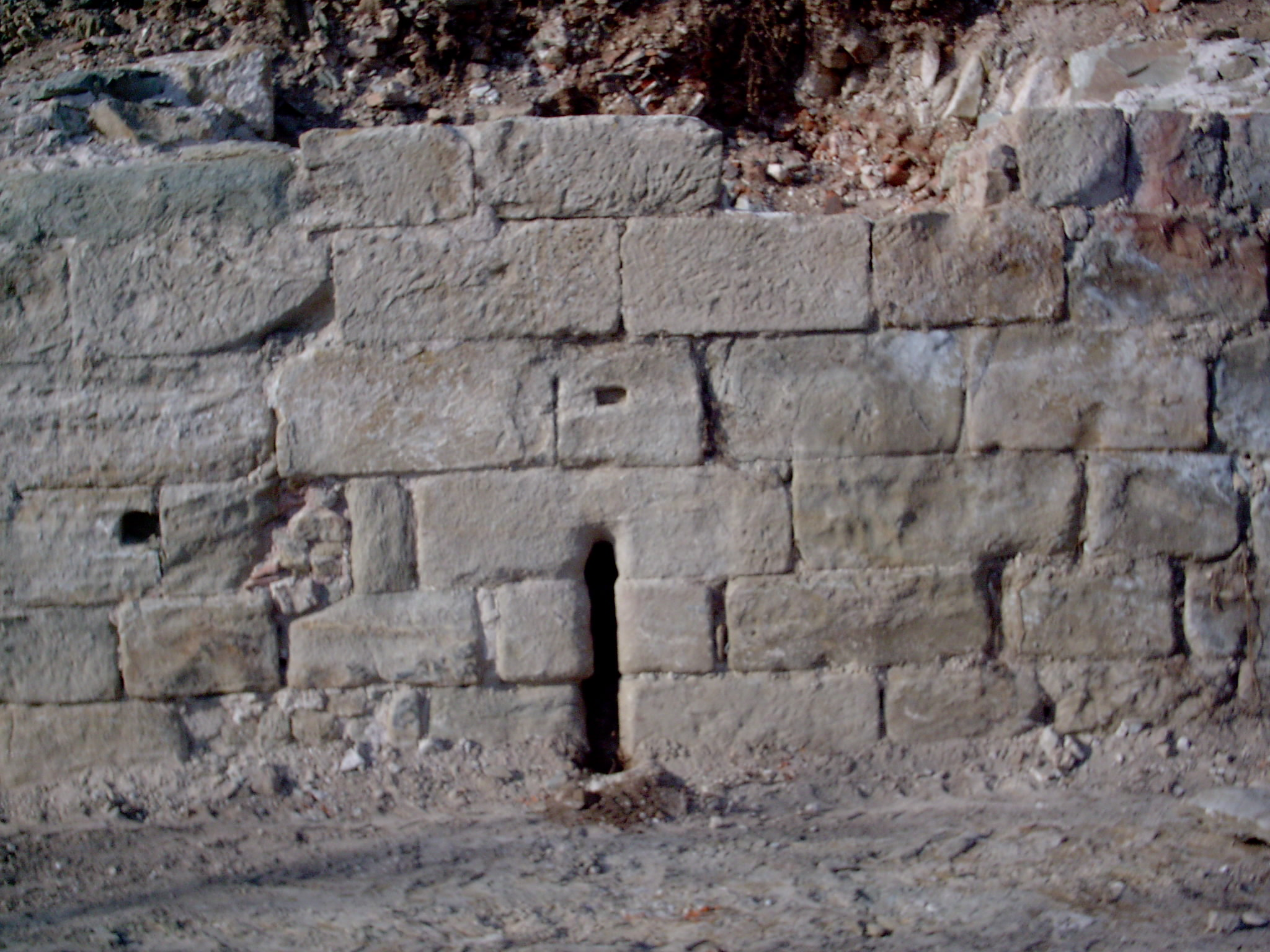 Hochmittelalterliche Ringmauer der Burg Königsberg; zum Teil im Schutt befindliche Lichtscharte. Fotografiert vor der Renovierung.